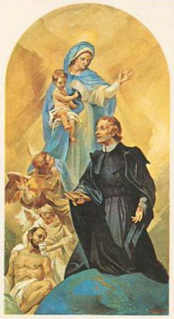 Carlo Steeb als Prediger